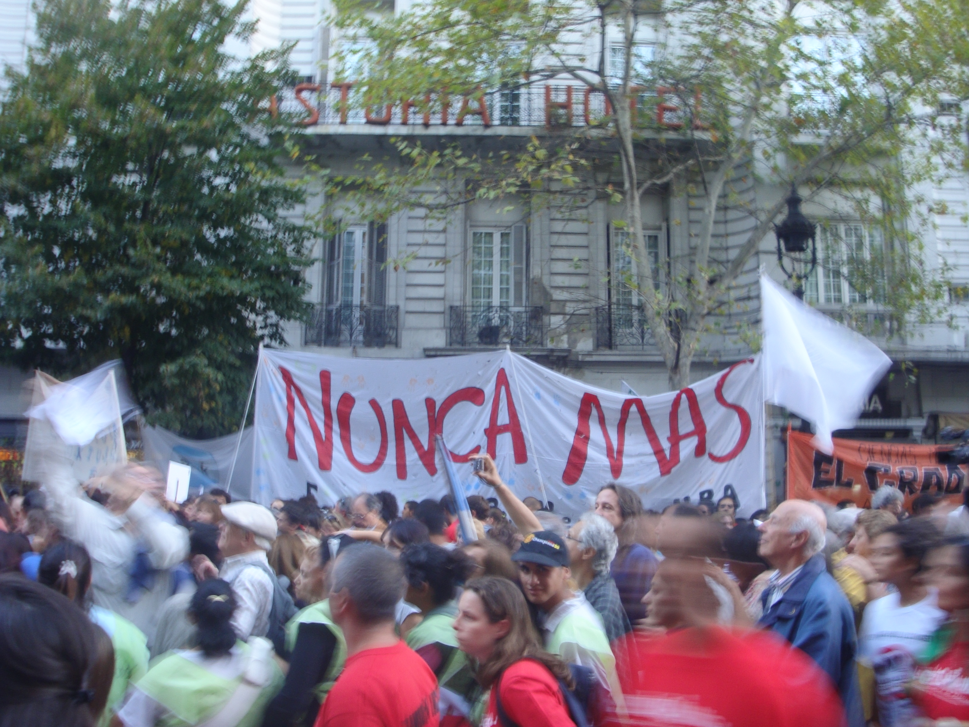 Bandera con la inscripción "Nunca más", durante la manifestación en conmemoración al 35º aniversario del golpe de Estado en Argentina de 1976